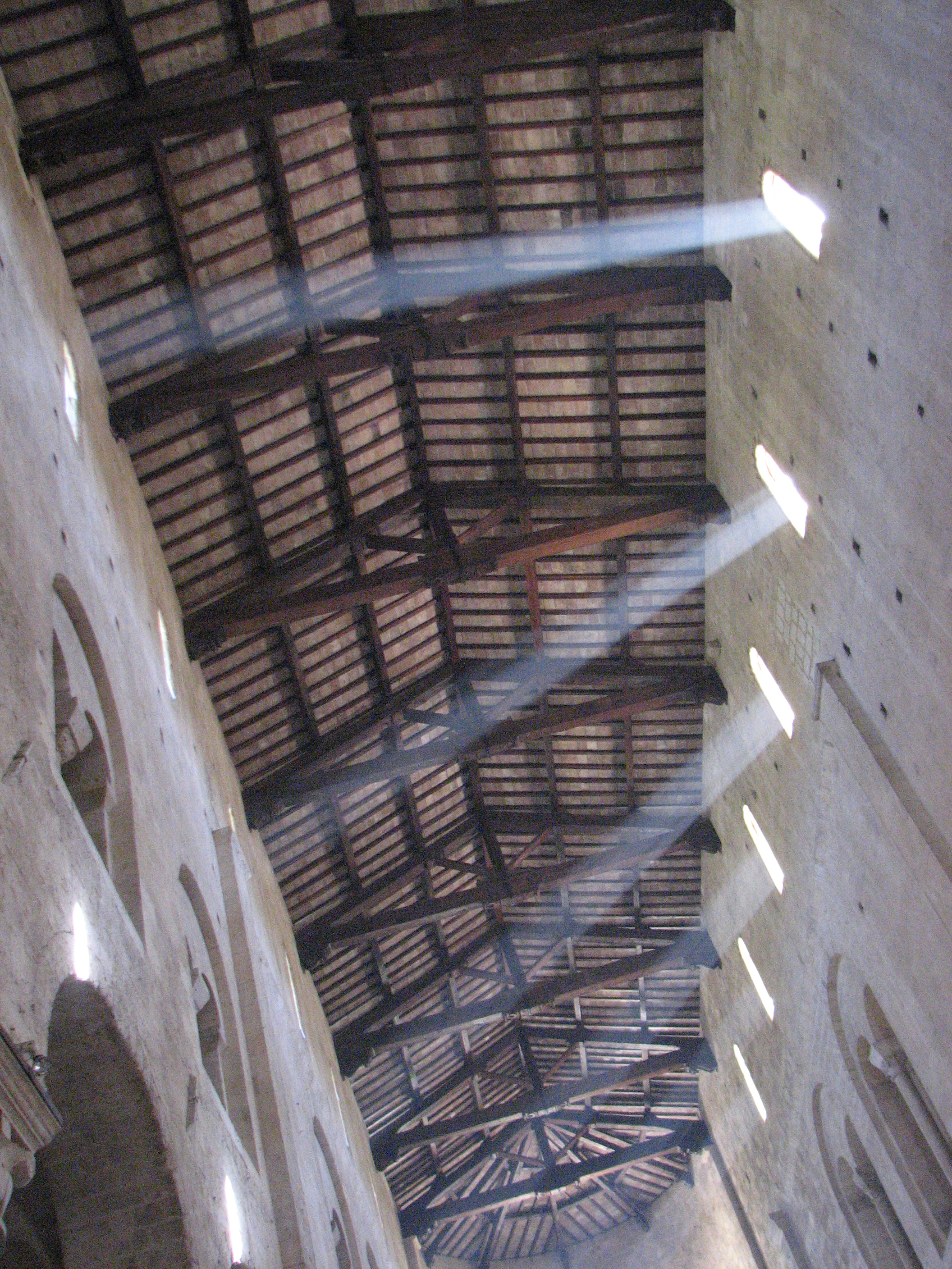 L'Abbazia di Sant'Antimo (Montalcino, Toscana, Italy) - Giochi di luce sul soffitto